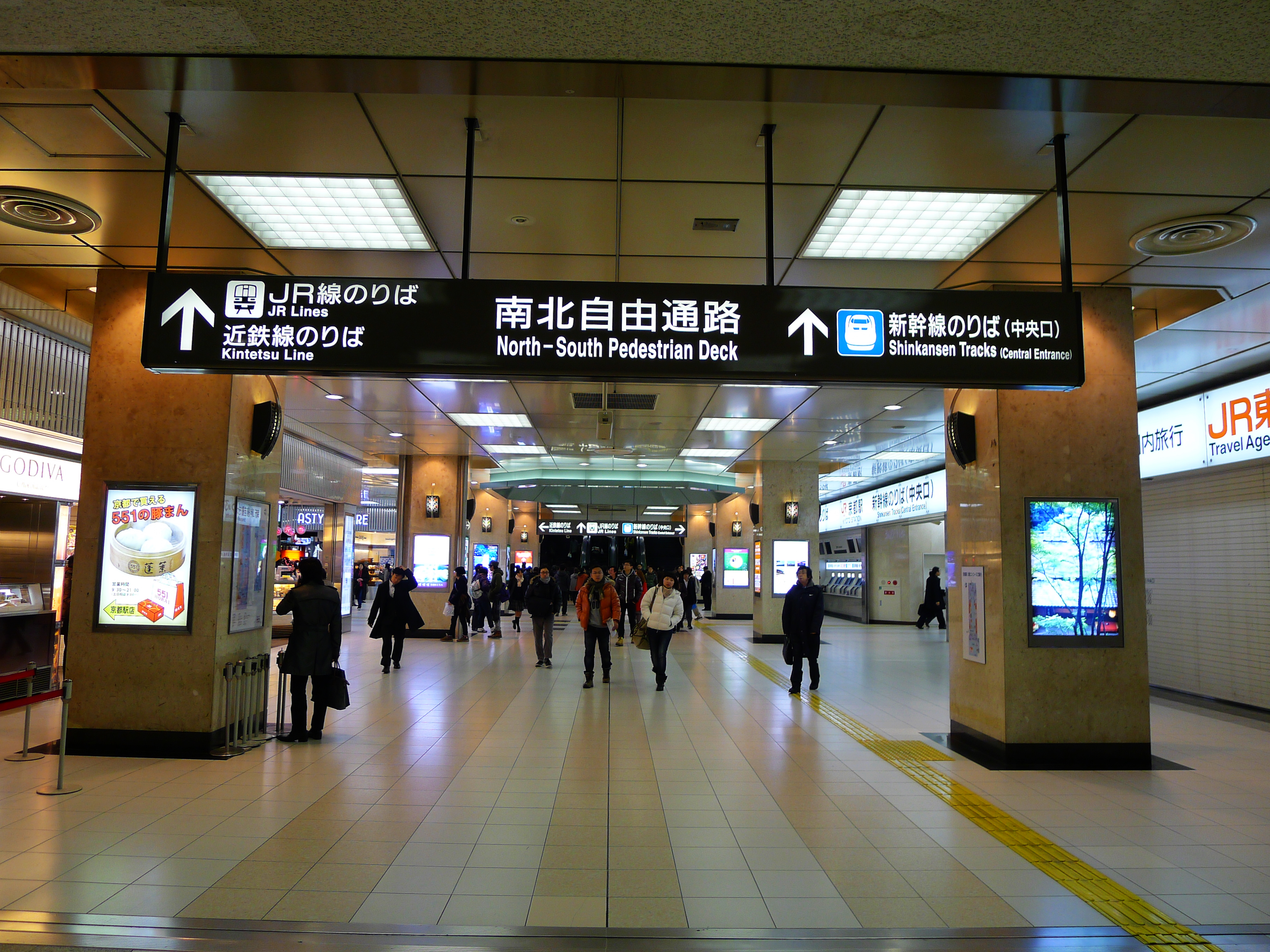 京都驿南北自由通路